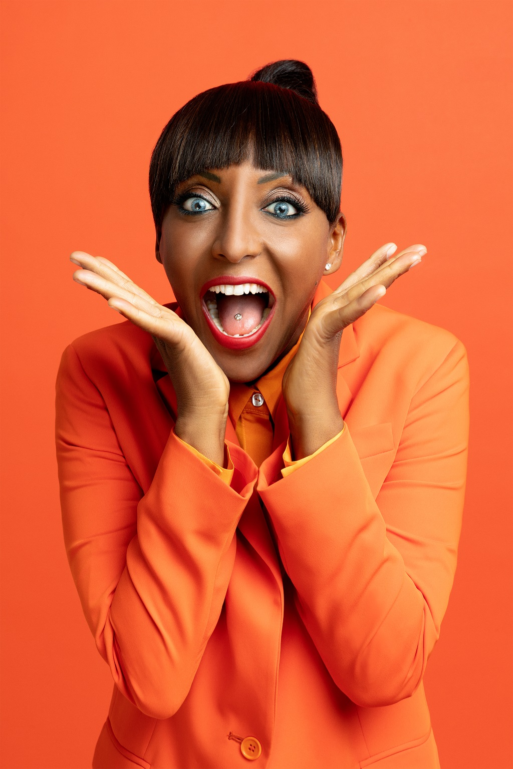 Senhit, cantautrice italiana